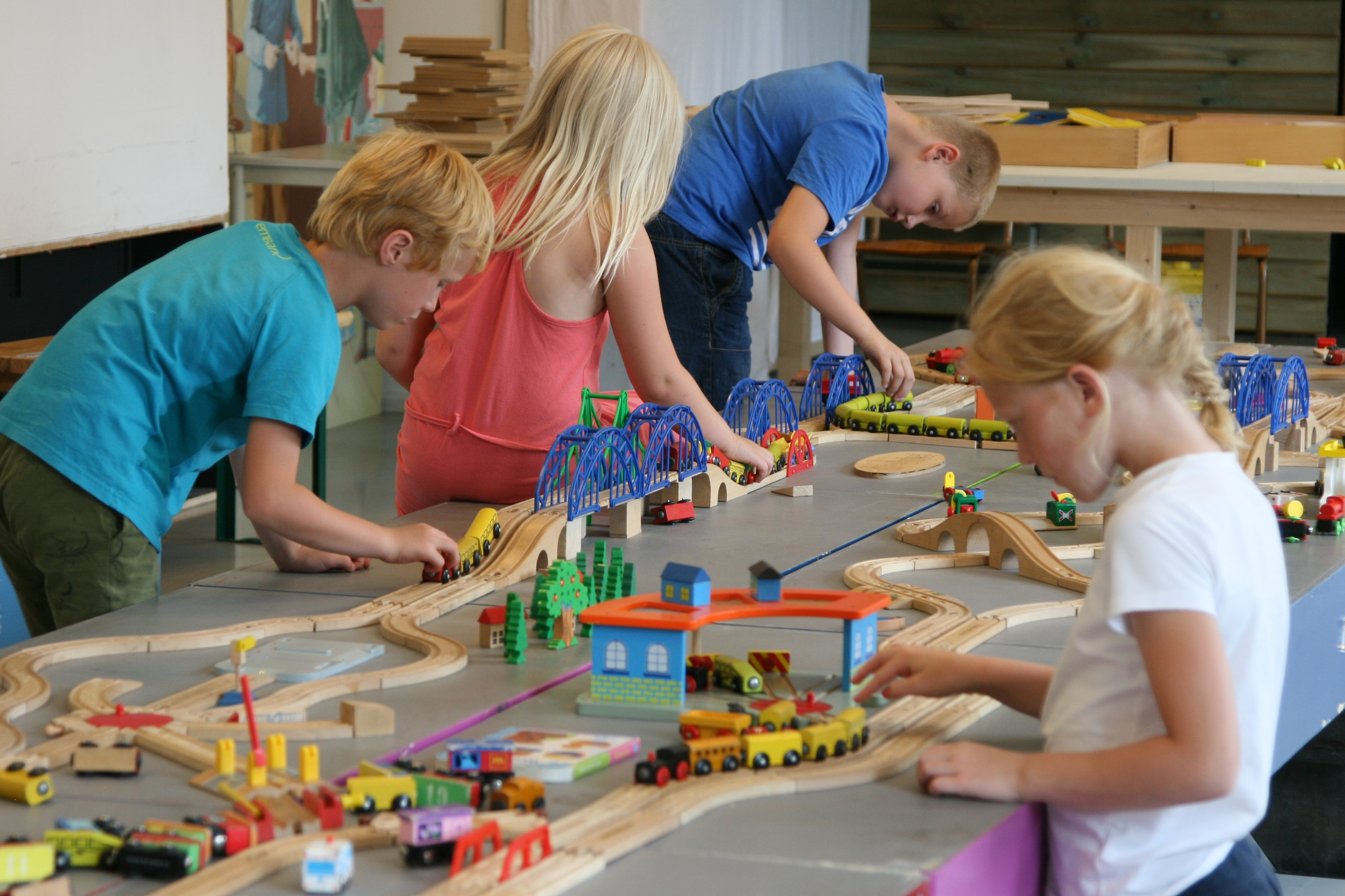 Kidsproject